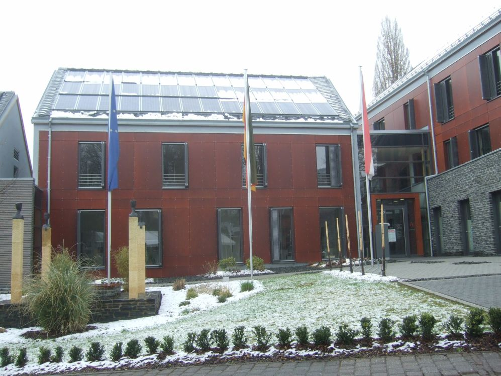 Rathaus Waldrach, Eingang